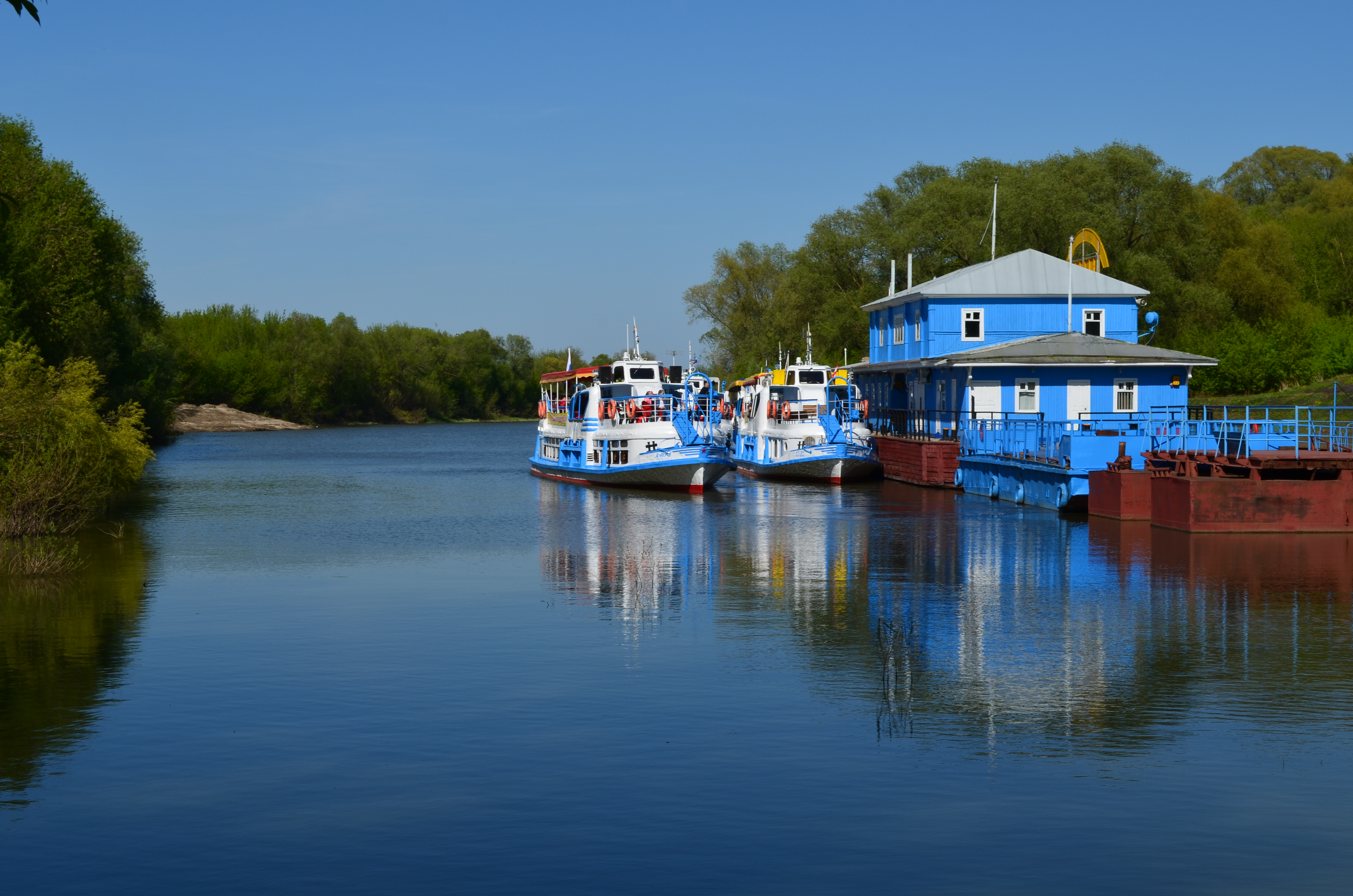 Река Трубеж в районе Рязанского кремля.